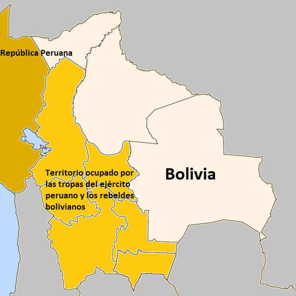 Mapa de la Intervención peruana en Bolivia de 1828